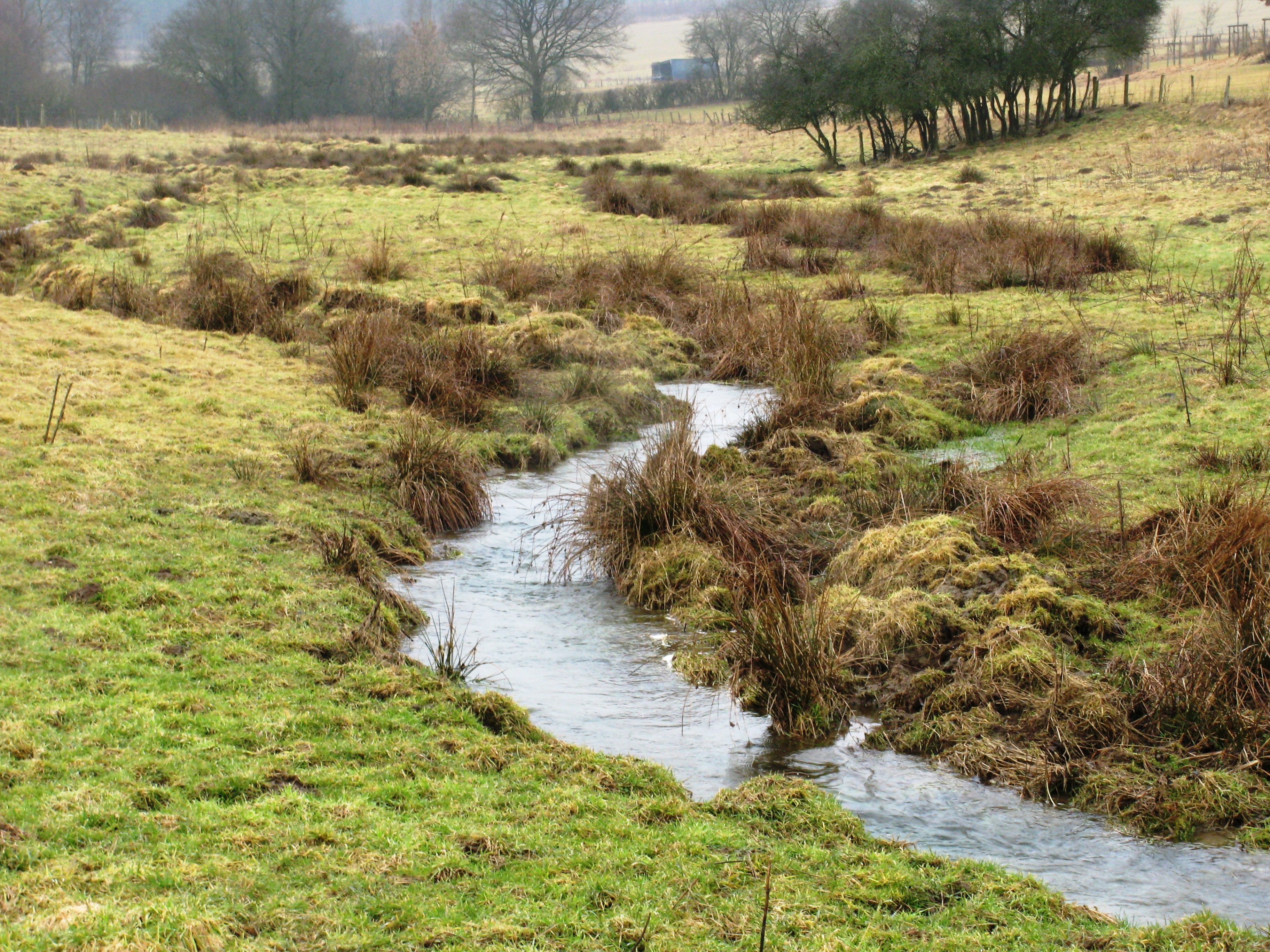 D'Kléngelbaach (Wolz) op der Déiwefuert.